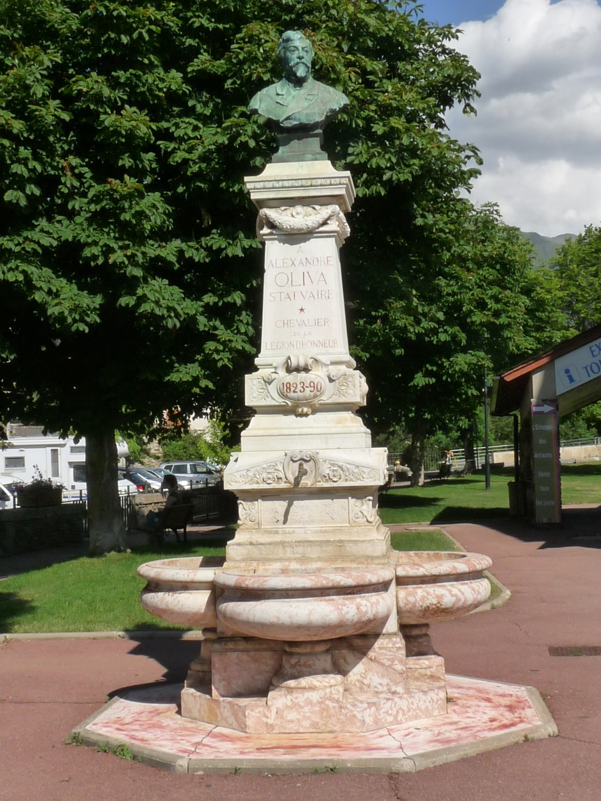 Statue d'Alexandre Oliva (1823-1890) et fontaine, Saillagouse, Pyrénées-Orientales, France